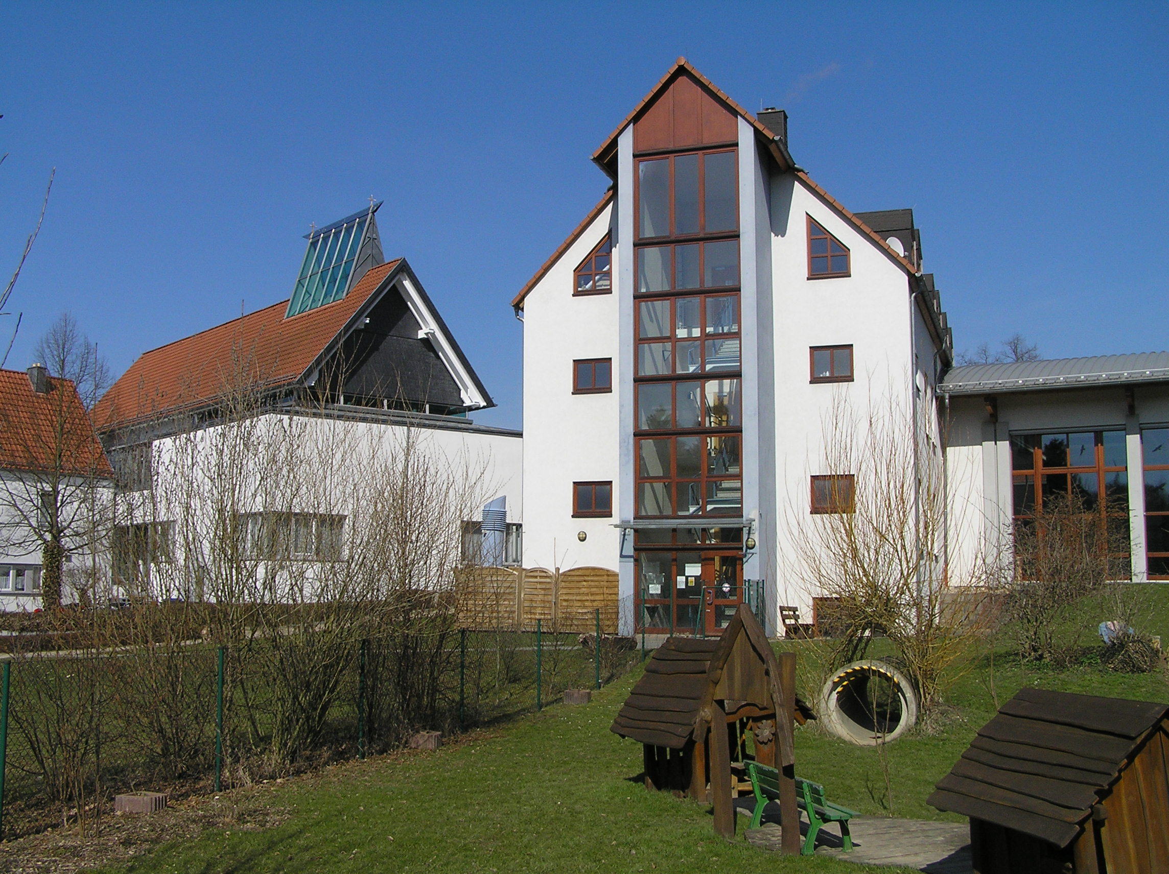 Esch, Gemeinde Waldems, Dorfgemeinschaftshaus und Gebäude der Kirchengemeinde